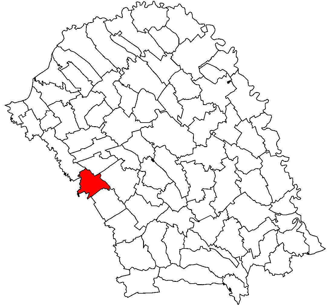 Categorie:Hărţi ale judeţului Botoşani